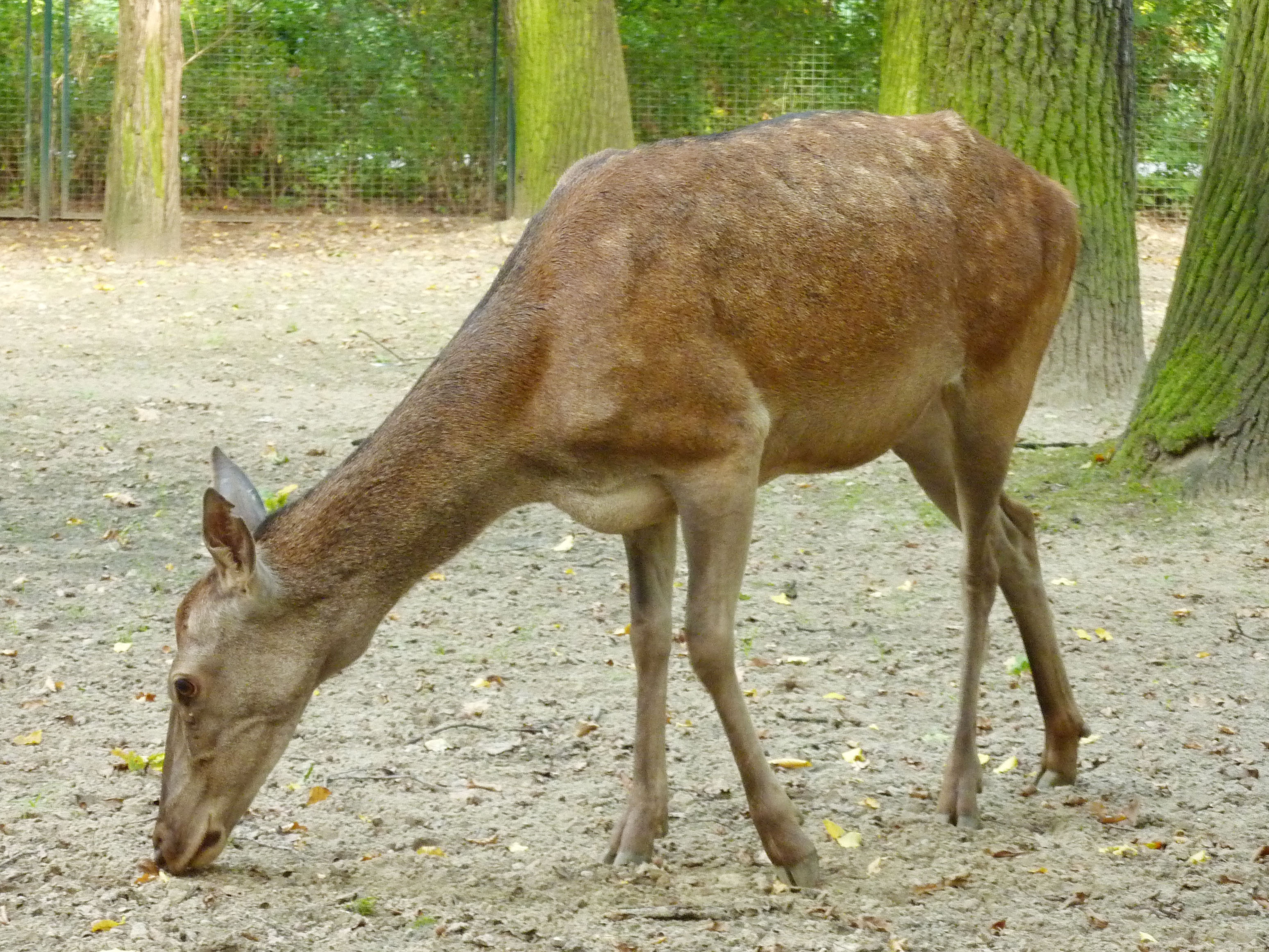 Weiblicher Atlashirsch (Berberhirsch, Cervus elaphus barbarus) im Tierpark Berlin-Friedrichsfelde, im ehemaligen Gehege der Mitteleuropäischen Rothirsche nahe dem Terrassencafé. Das Tier kam im Jahr 2010 zusammen mit einem männlichen und zwei weiteren weiblichen Exemplaren dieser Art aus der Nachzucht des San Diego Wild Animal Park, der bis dahin außerhalb Nordafrikas einzigen Haltung dieser Unterart des Rothirsches.